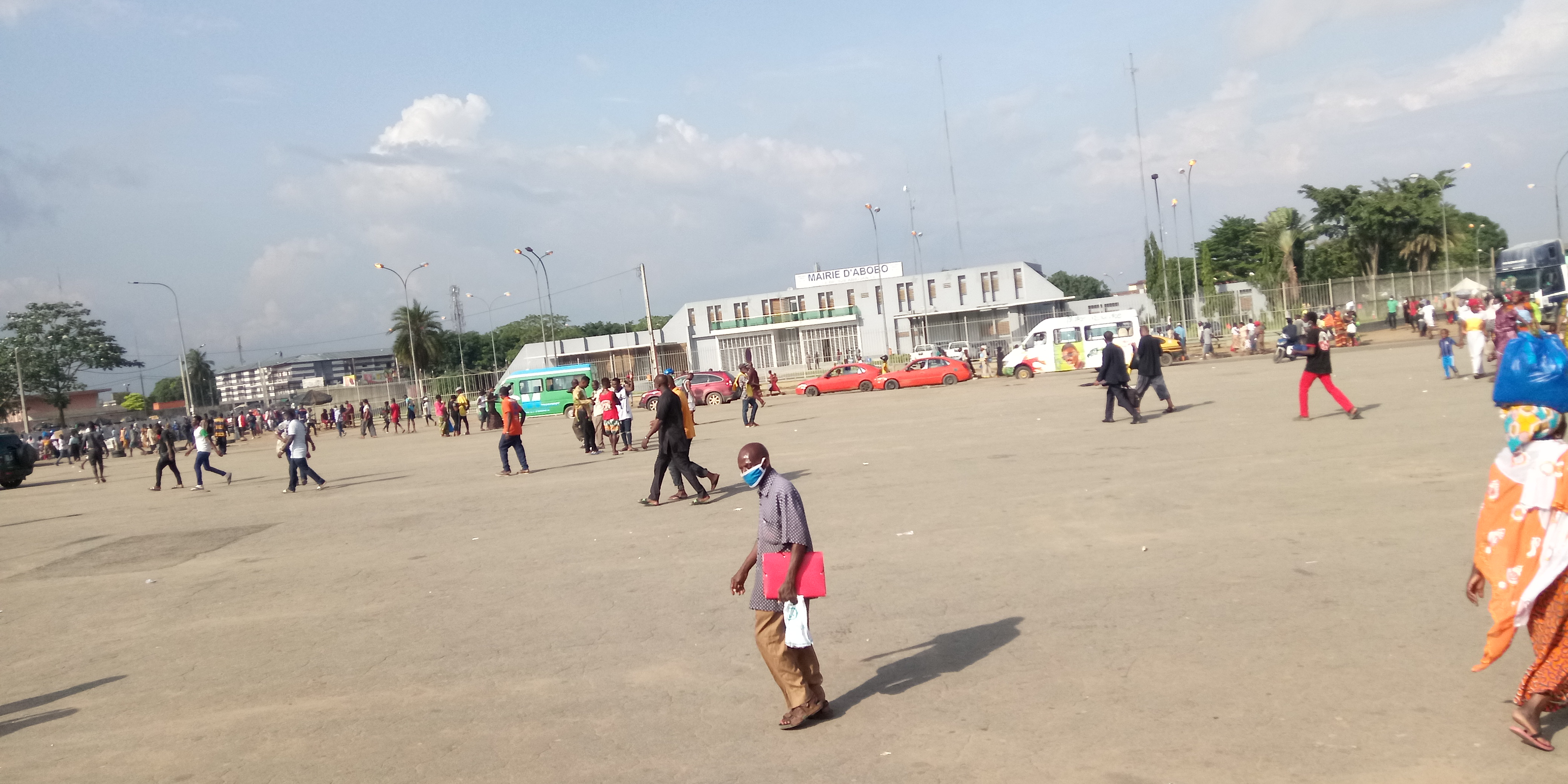 devanture